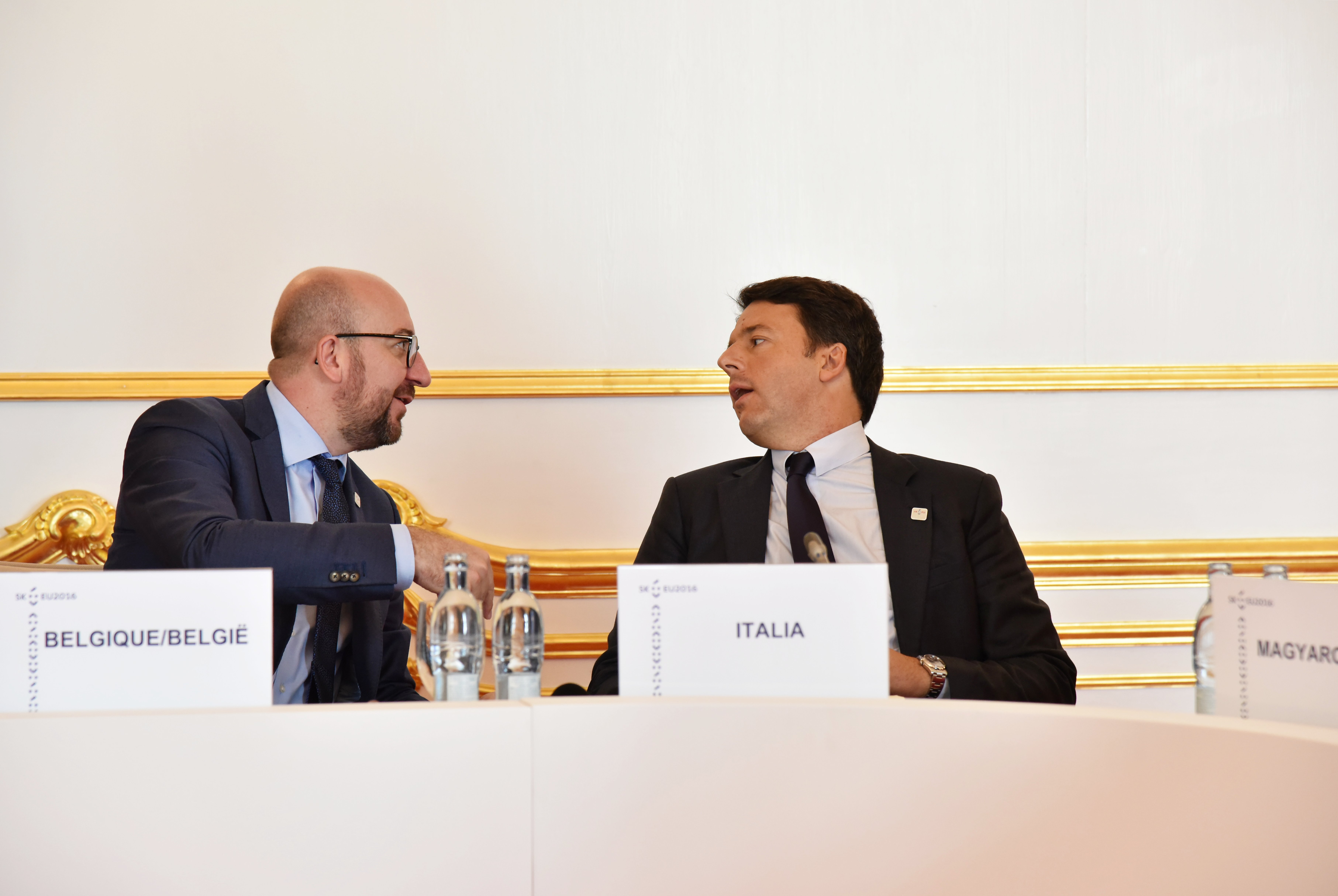 BRATISLAVA SUMMIT 16 SEPTEMBER 2016 ph halime sarrag